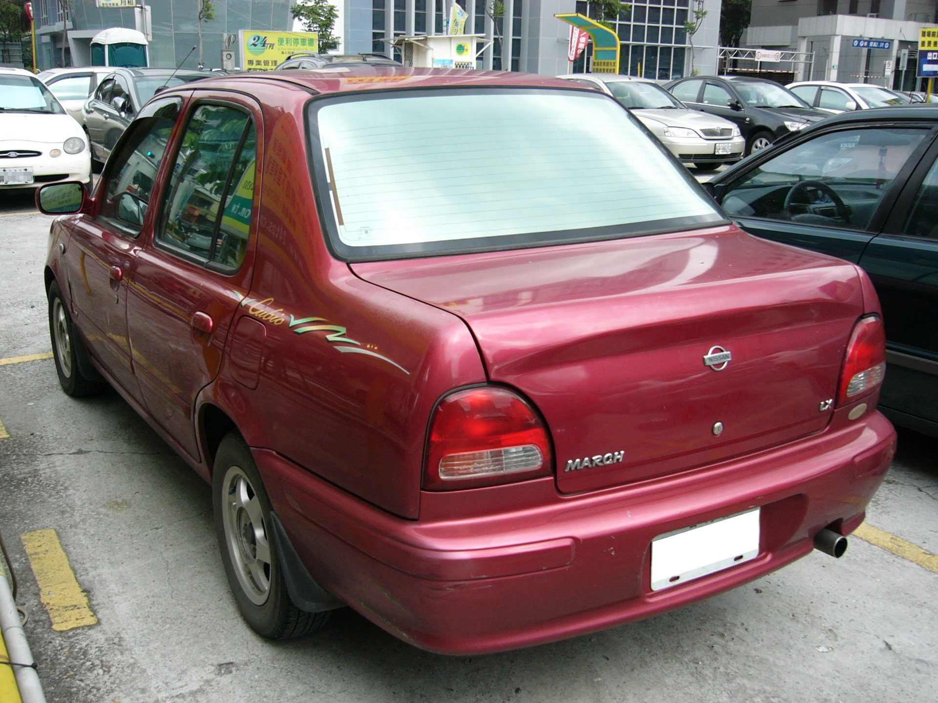 台灣的日產March LX轎車左後方外觀